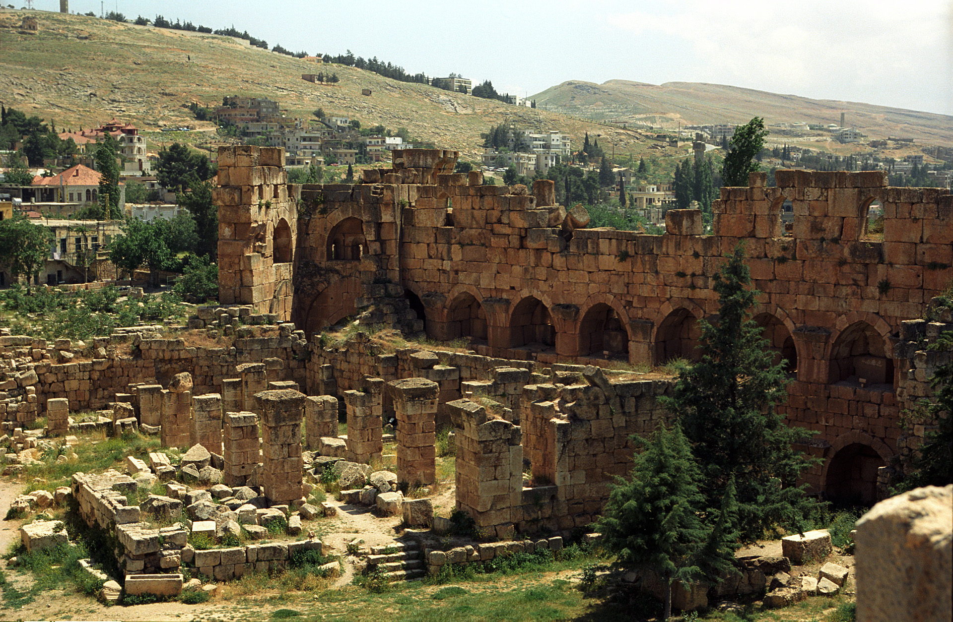 Baalbek, Mosque